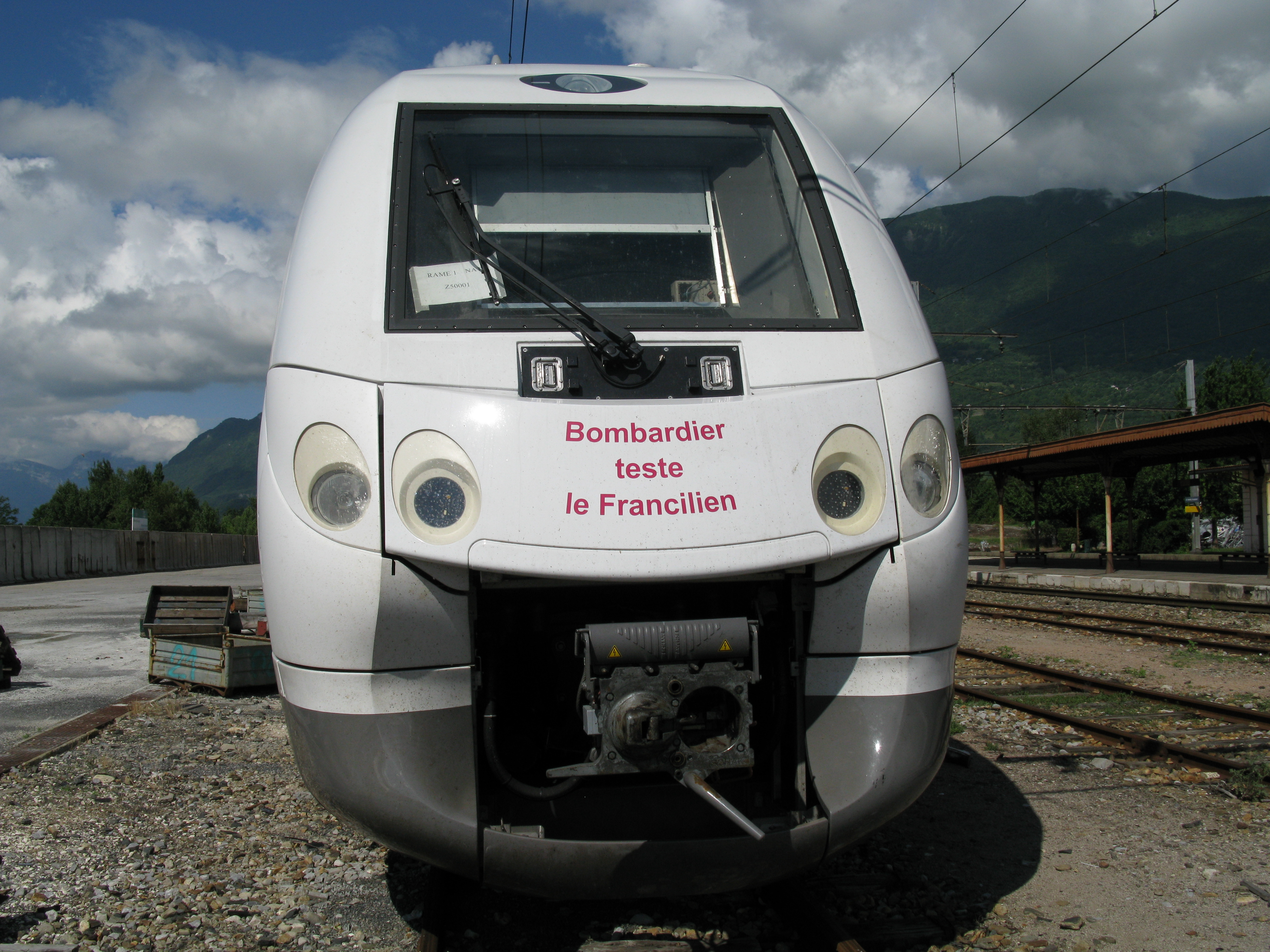 Rame Francilen N°1 (Z50001/2) garée à Saint-Pierre-d’Albigny (Savoie) pendant la période de test entre Saint-Jean-de-Maurienne et Modane en Juin 2009.